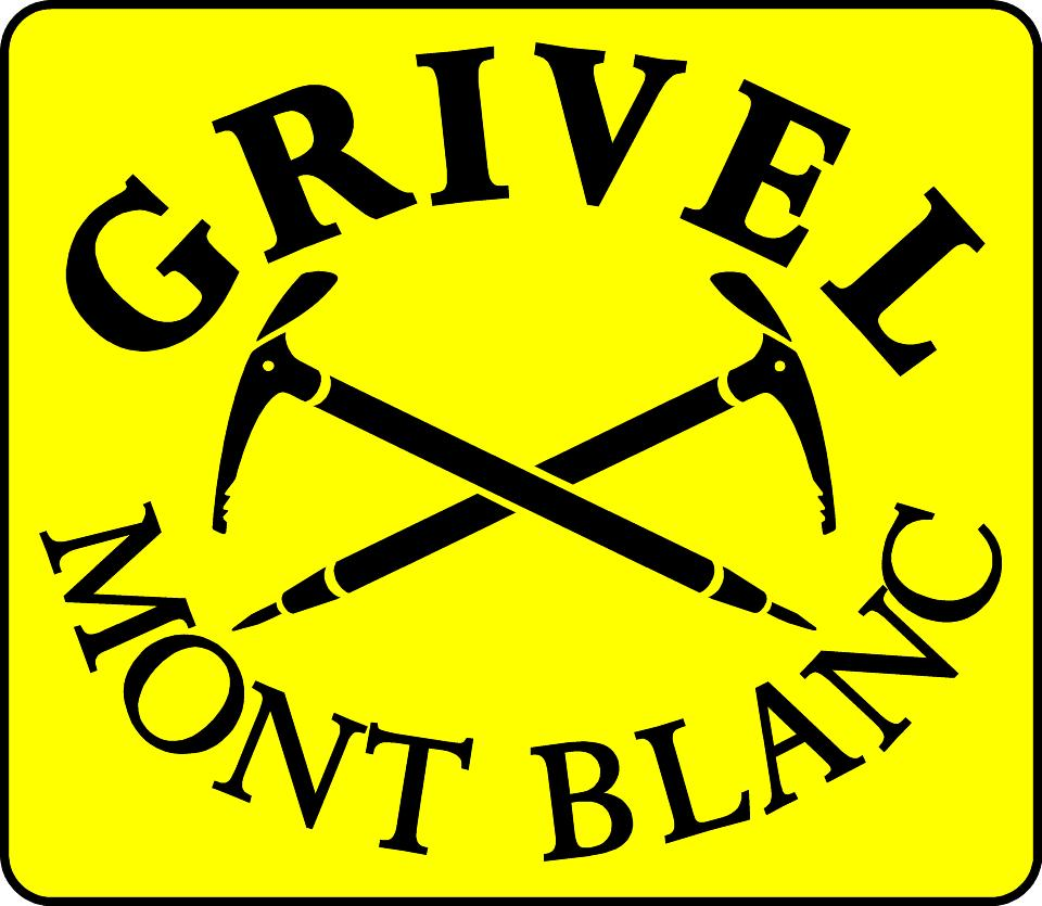 Logo Grivel Mont Blanc